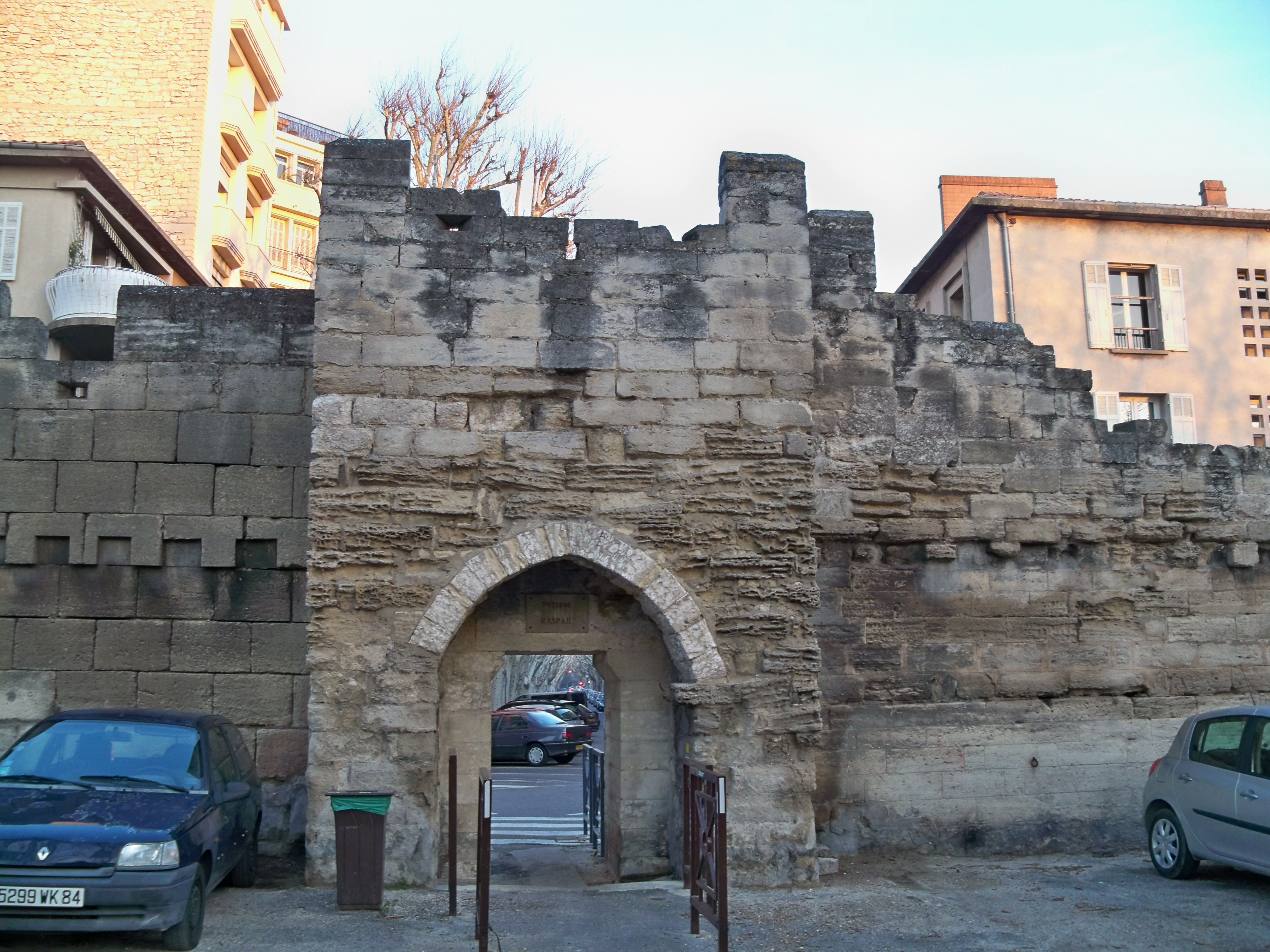 Poterne Raspail des remparts d'Avignon, Vaucluse, France